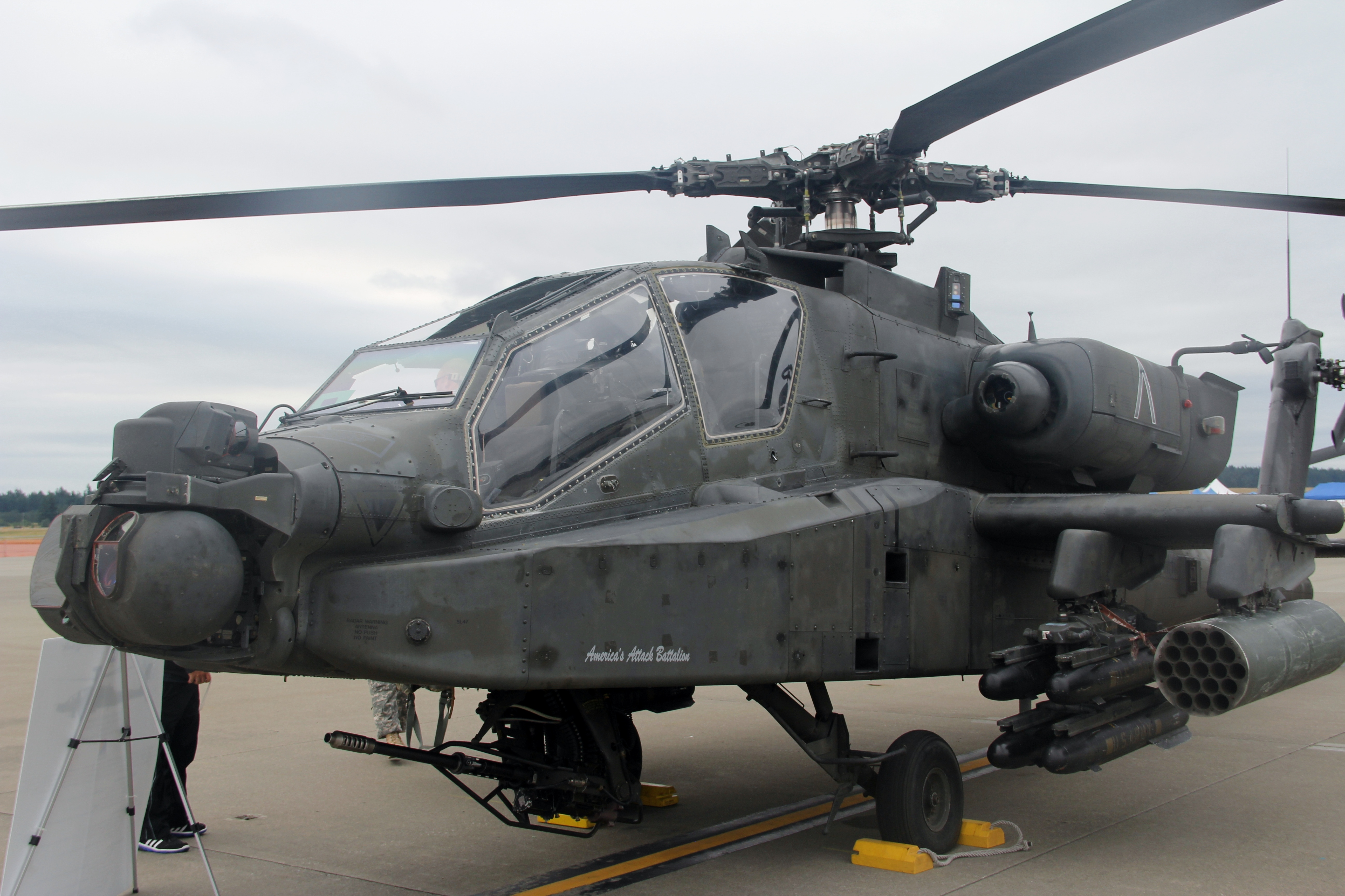 Boeing AH-64 Apache